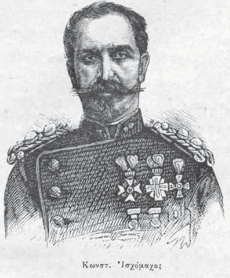 namhafte Griechische Persönlichkeit, 19. Jahrhundert